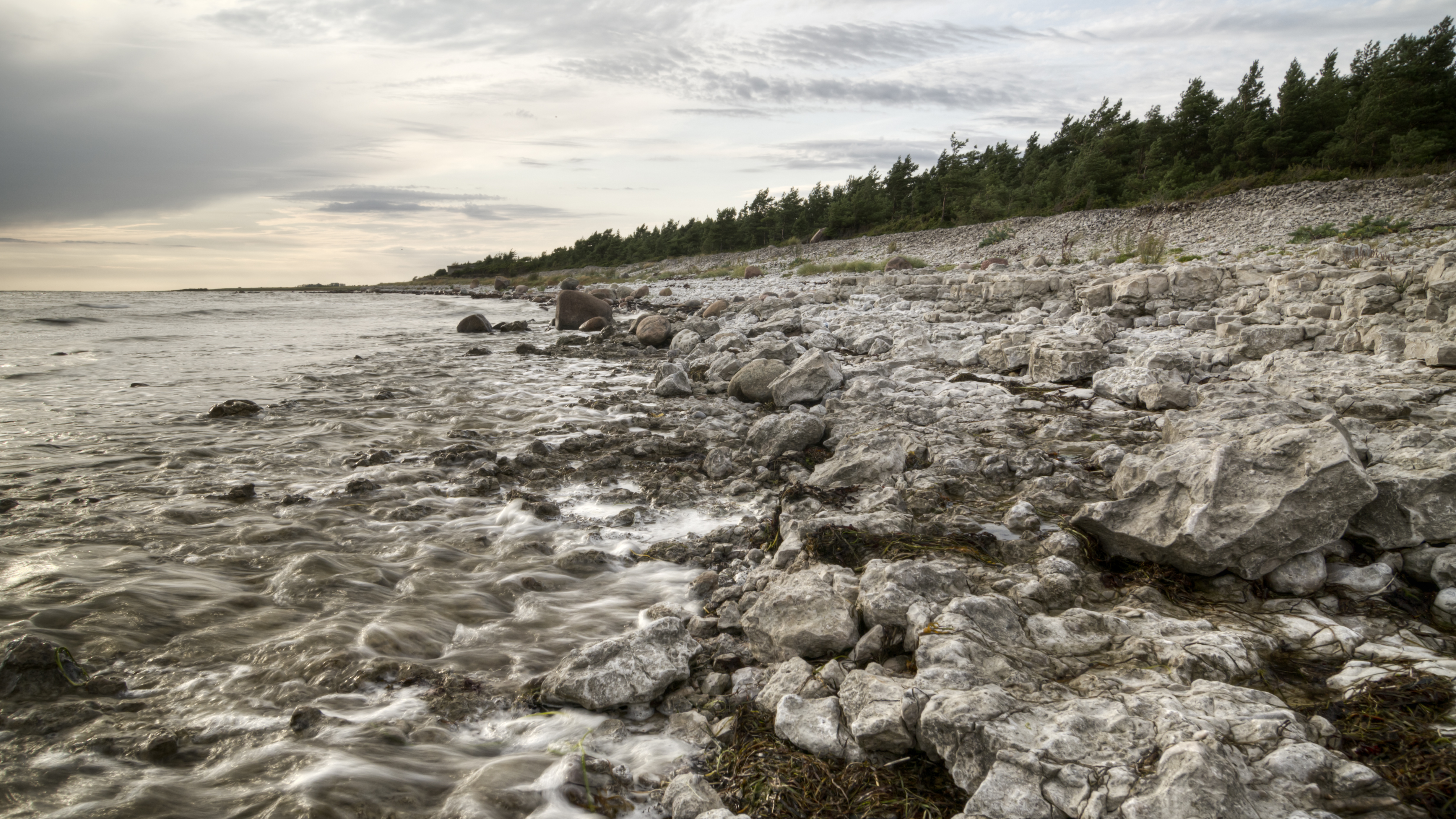 Katri pank, Karala-Pilguse hoiuala